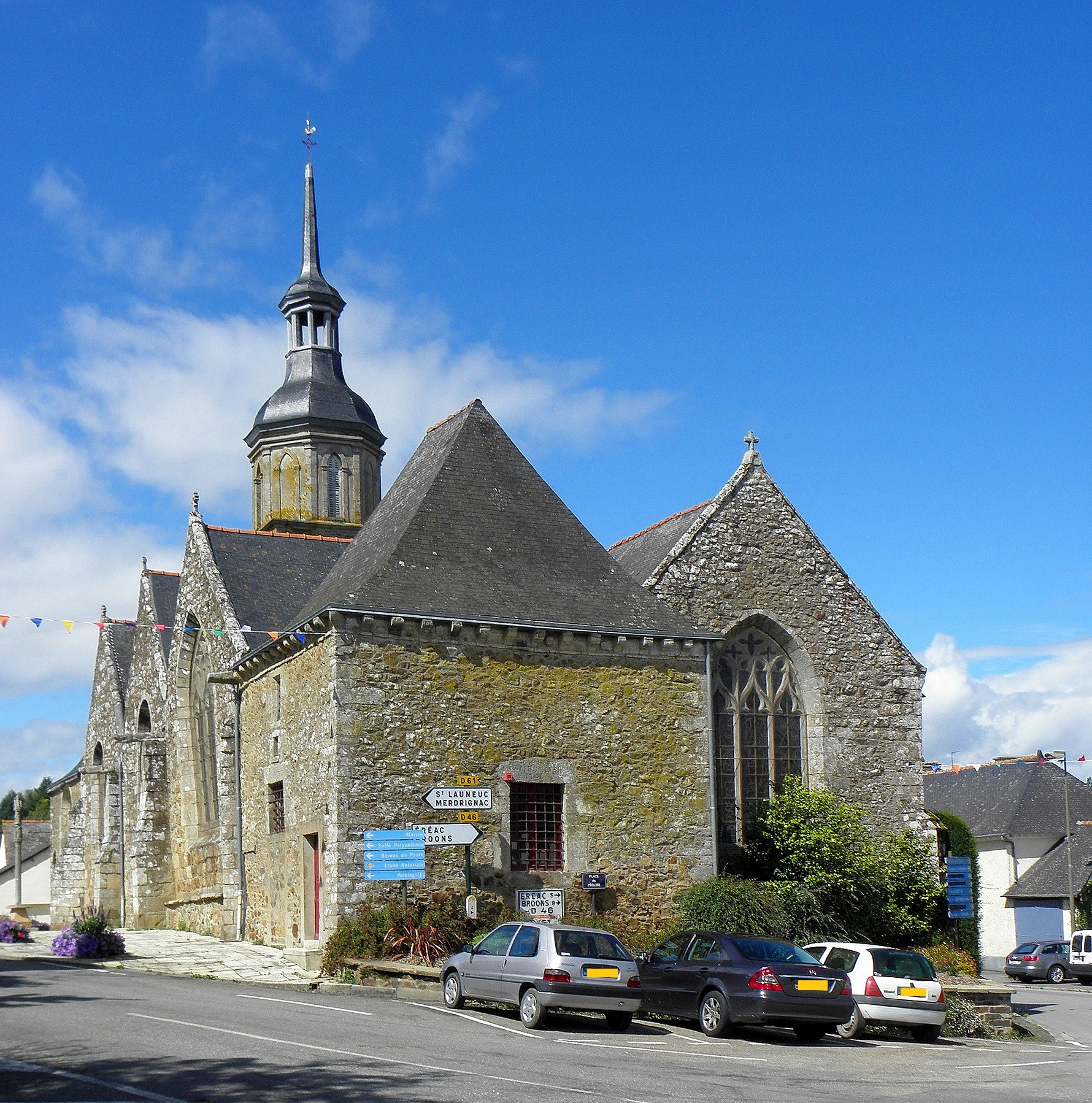 Sacristie et chevet de l'église Saint-Jean-Baptiste de Lanrelas (22).